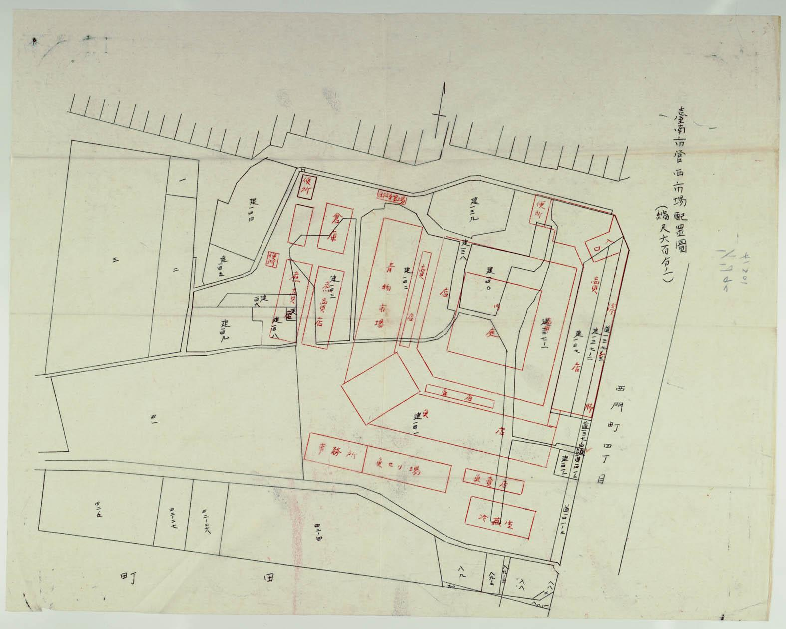 可見西市場本館、西市場外廓賣店第二期，魚セリ場（原臺南州青果同業組合香蕉倉庫）